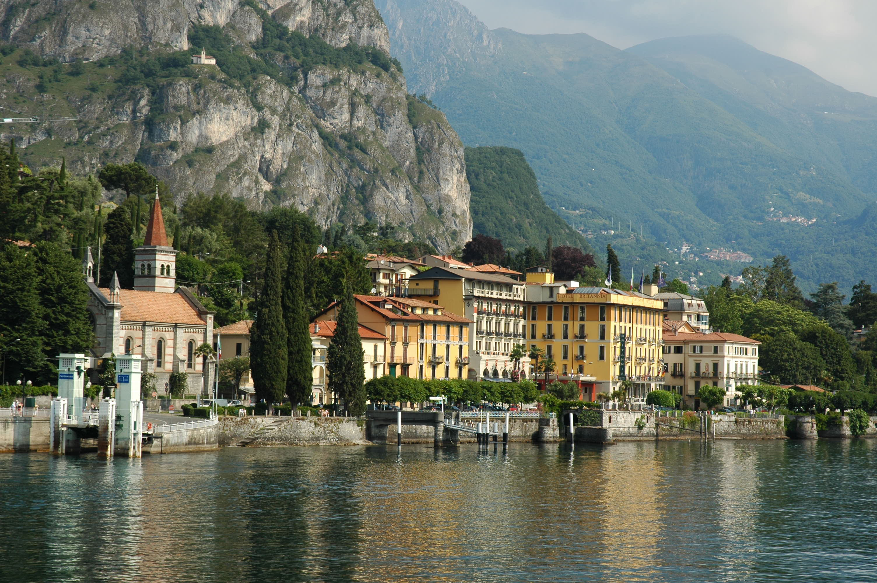 Cadenabbia Lake Como